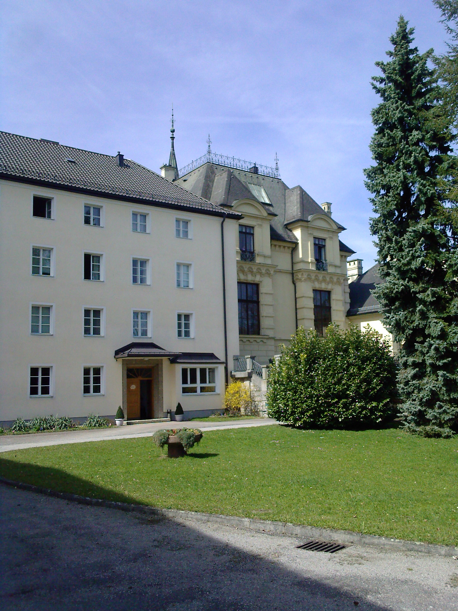 Das Johannesschlössl auf dem Salzburger Mönchsberg